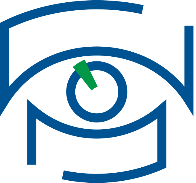 НИИГБ